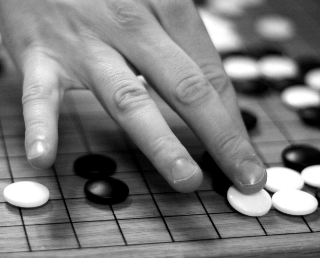 go